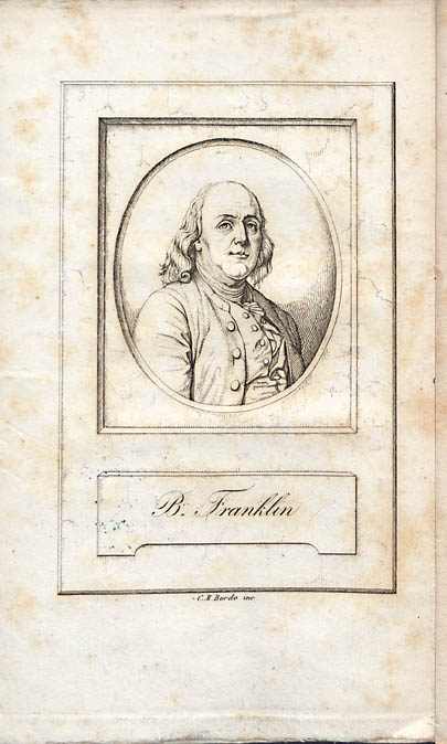 La scuola della economia e della morale, ossia Avvertimenti a tutti quelli che desiderano essere ricchi, sani e virtuosi. Opuscoli di Beniamino Franklin. - Pavia : nella stamperia di V. Fusi e Comp., 1825. - XII, 83, [1] p., [1] c. di tav. : ritratto ; 8º . Ritratto dell'autore